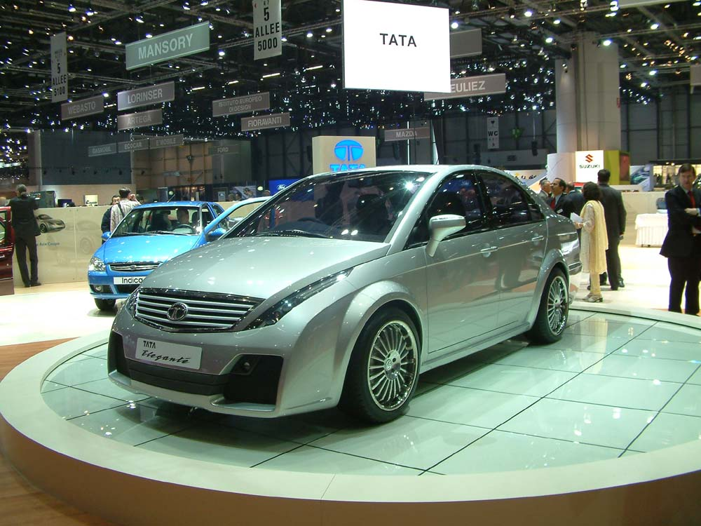 Tata Elegante at Geneva Auto Show